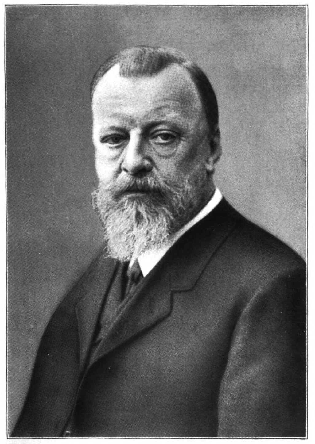 Goswin von der Ropp (1850-1919), Porträtfoto um 1915